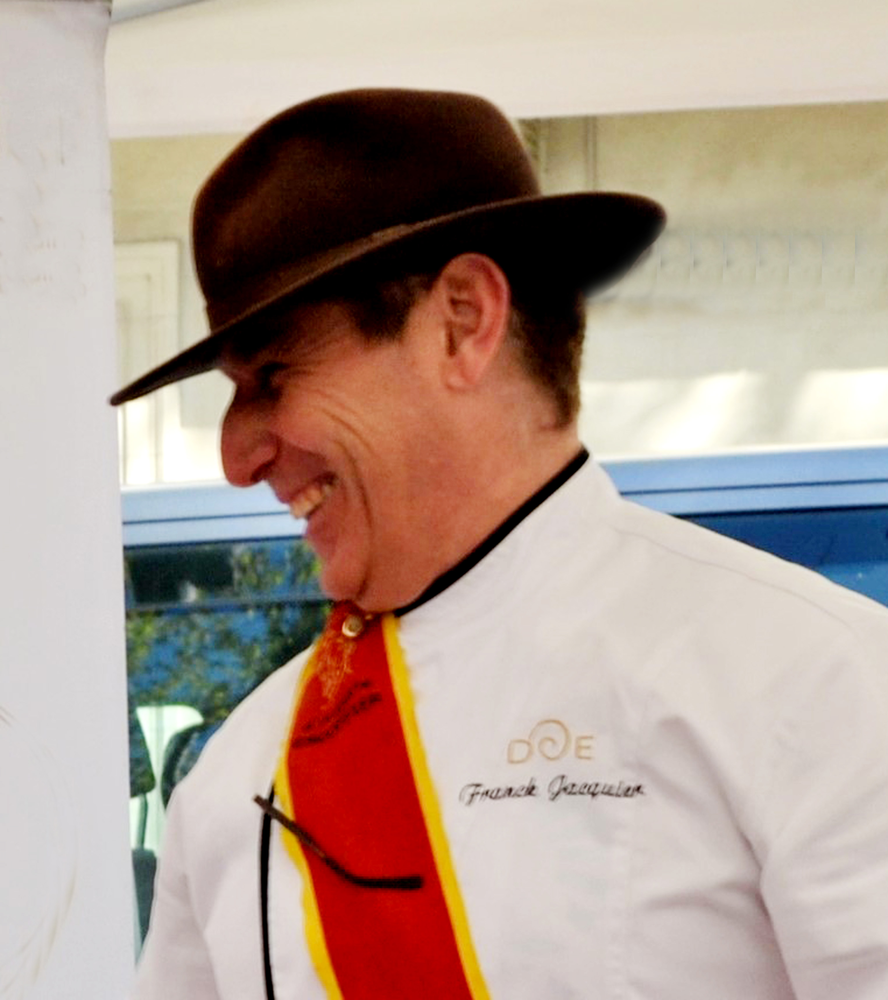 Franck Jacquier chef de cuisine à Lou Vignarès de Vedène